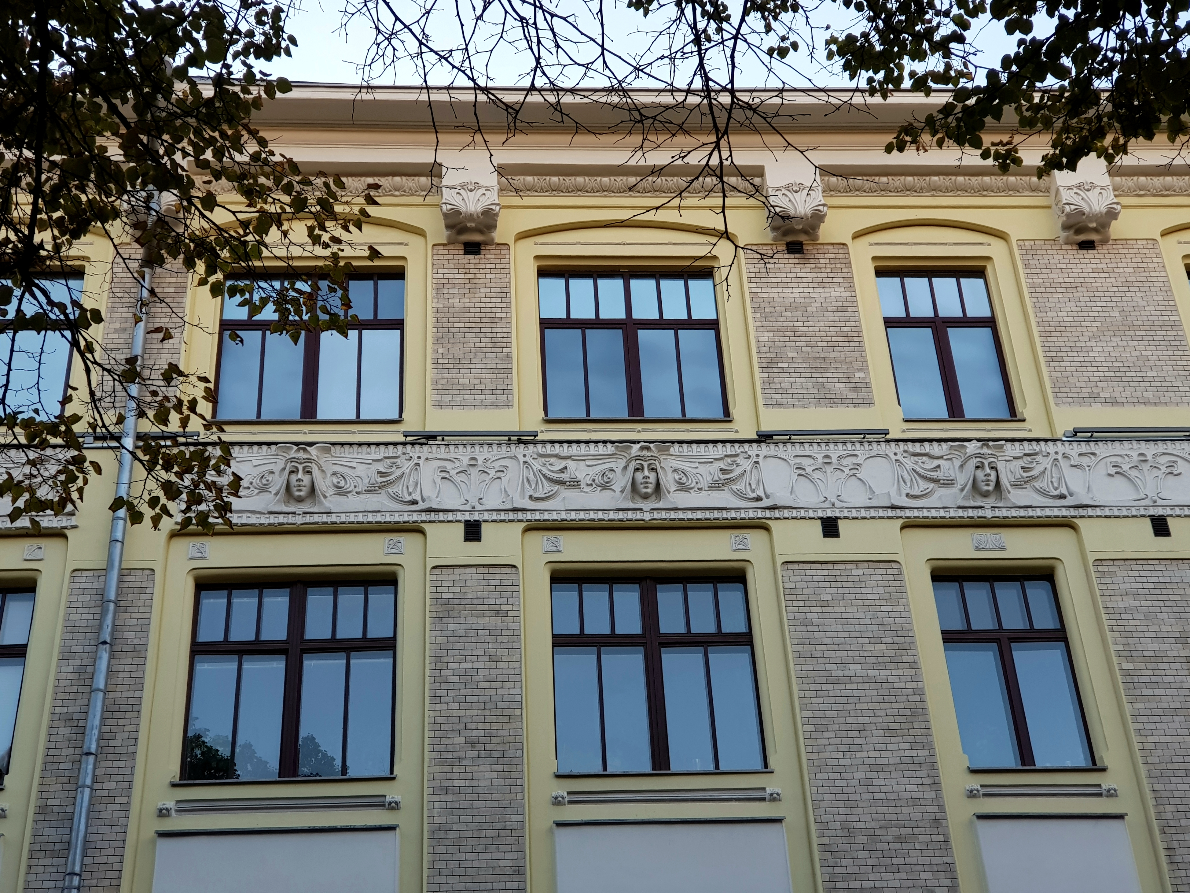 Доходный дом Бочаровых, 1902-1903 гг, арх-ры Л. Н. Кекушев, К. Ф. Буров. Москва, Гоголевский бульвар, д. 21, стр. 1